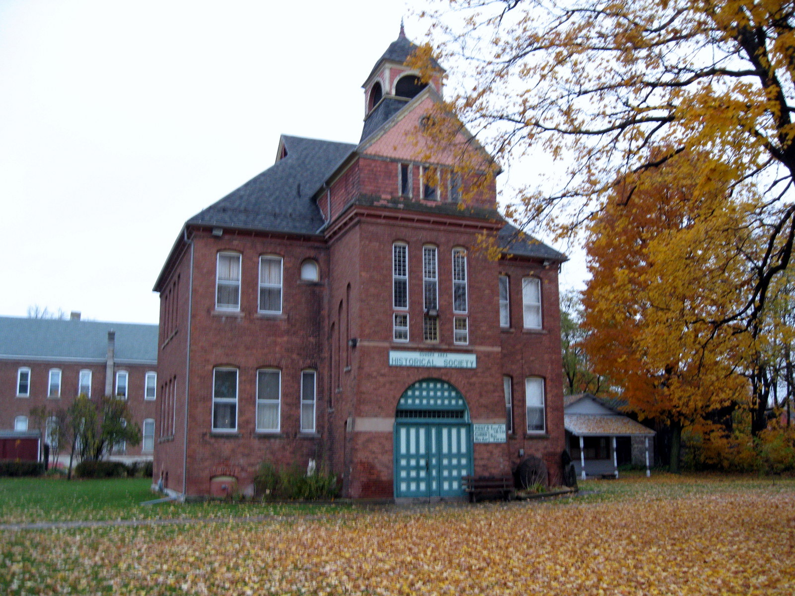 Dundee, New York